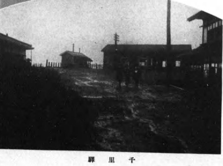 高山本線千里駅